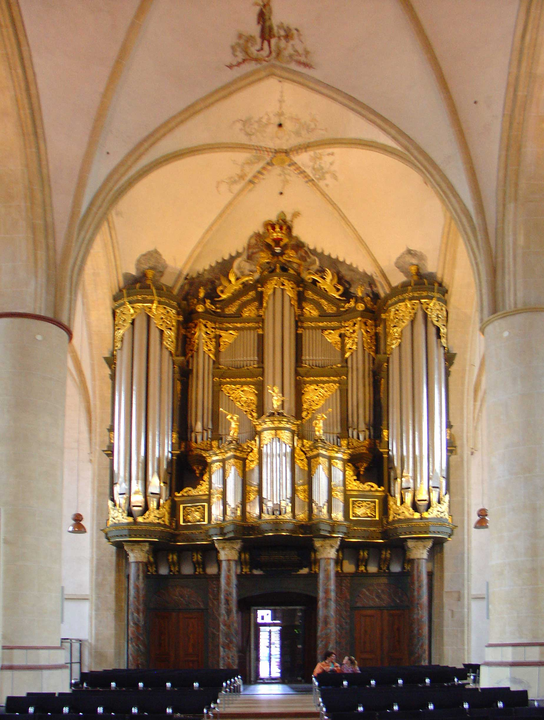 Arp Schnitger orgel in de Martinikerk Groningen